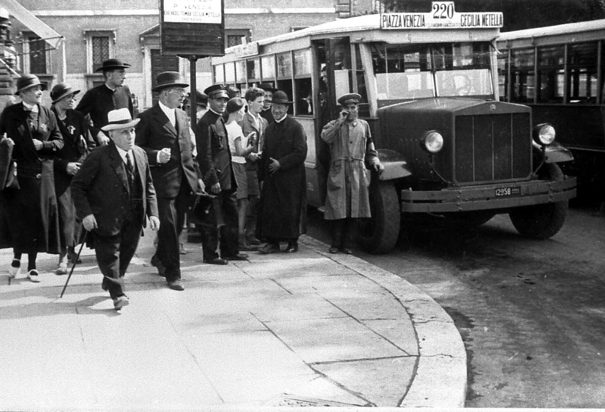 Autobus Alfa Romeo 85-A in piazza Venezia (1933)